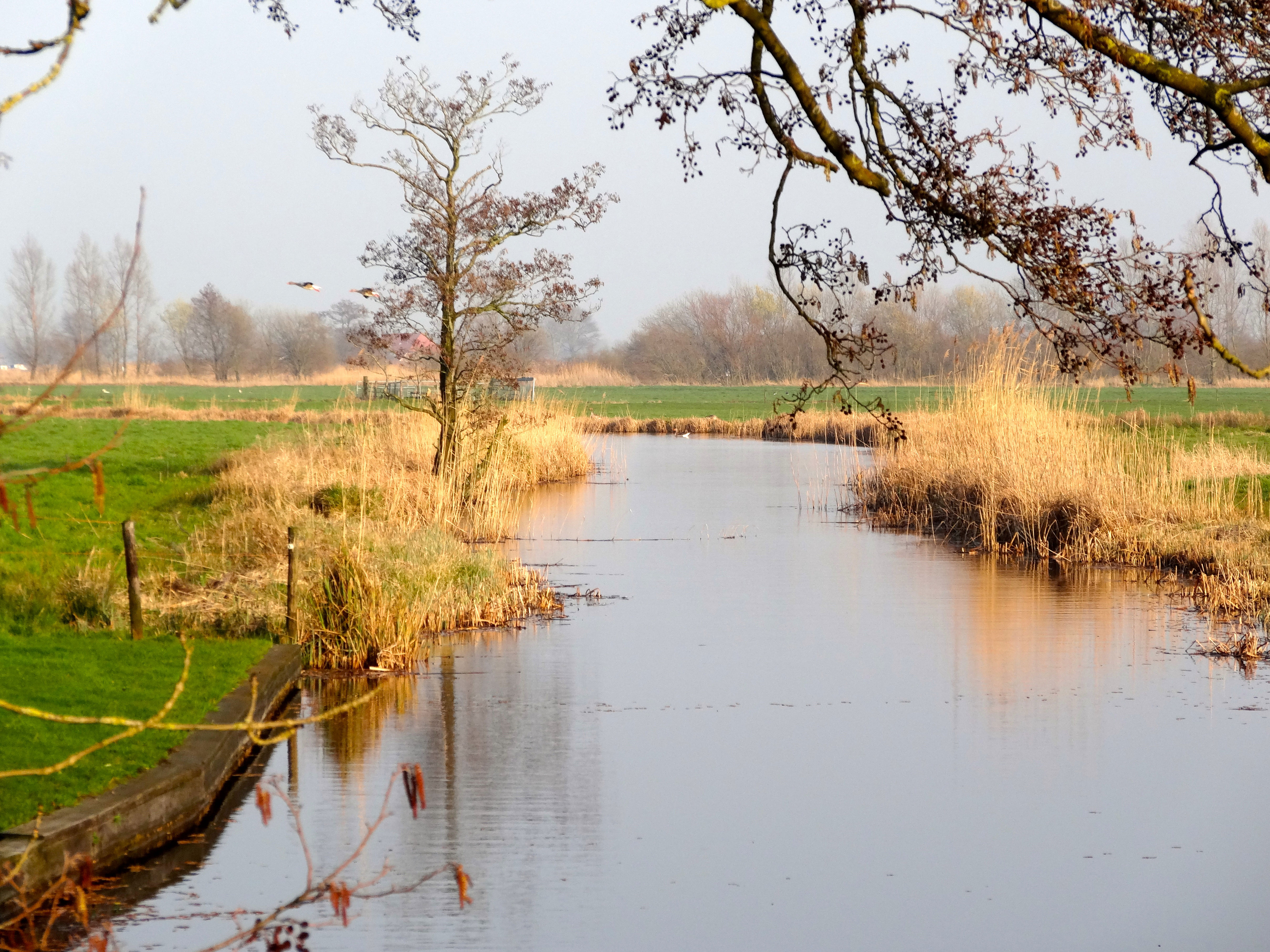 Muggenbeet (het gelijknamige water bij de buurtschap Muggenbeet)